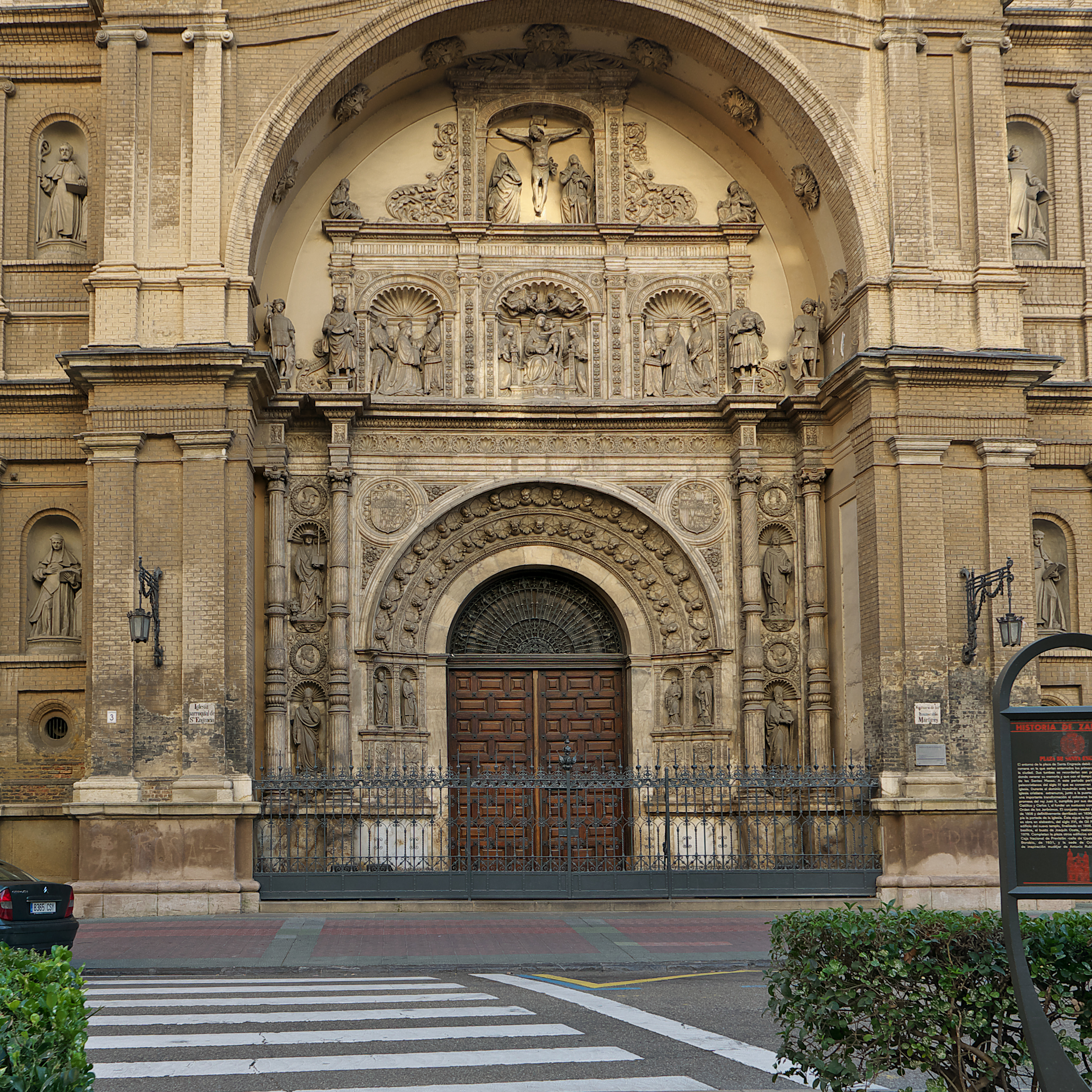 Magnífica portada de Gil Morlanes el Viejo (1511) para la Orden de San Jerónimo. Su hijo, Gil Morlanes el Joven la terminará en 1517. Carlos Palao restauró parte de la escultura.